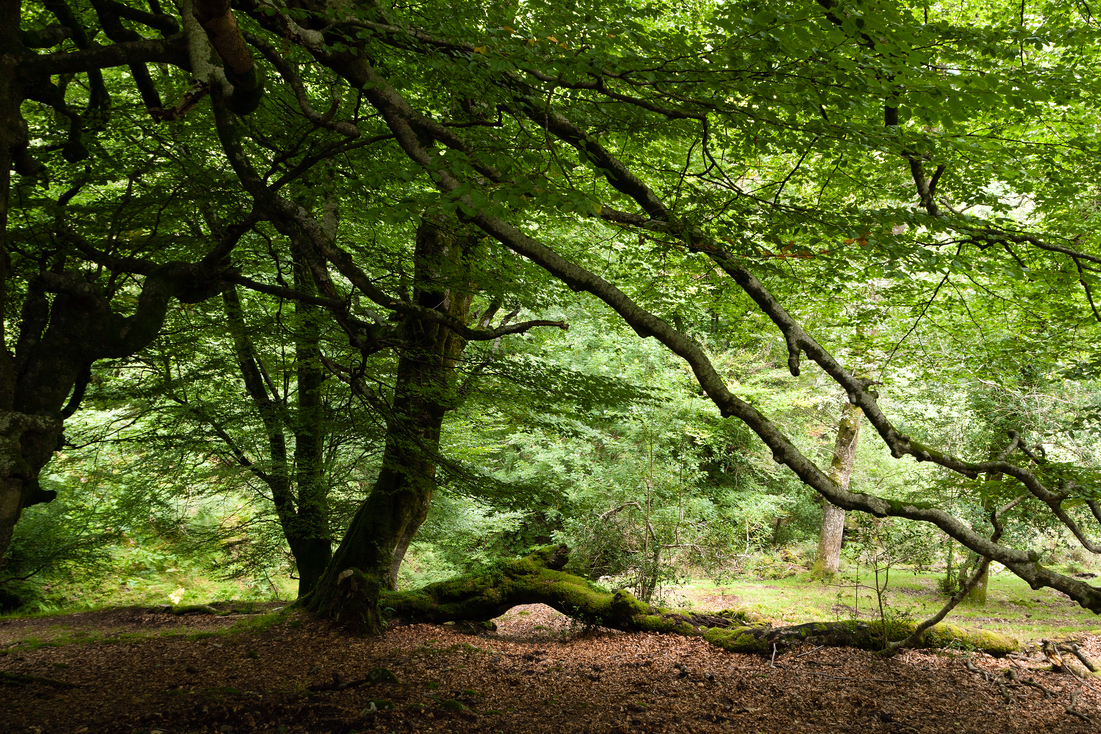 Una imagen del Hayedo de la Biescona, en la Sierra del Sueve (Asturias) This is a photography of a Site of Community Importance in Spain with the ID: ES1200043. Natura2000 entry, EEA entry